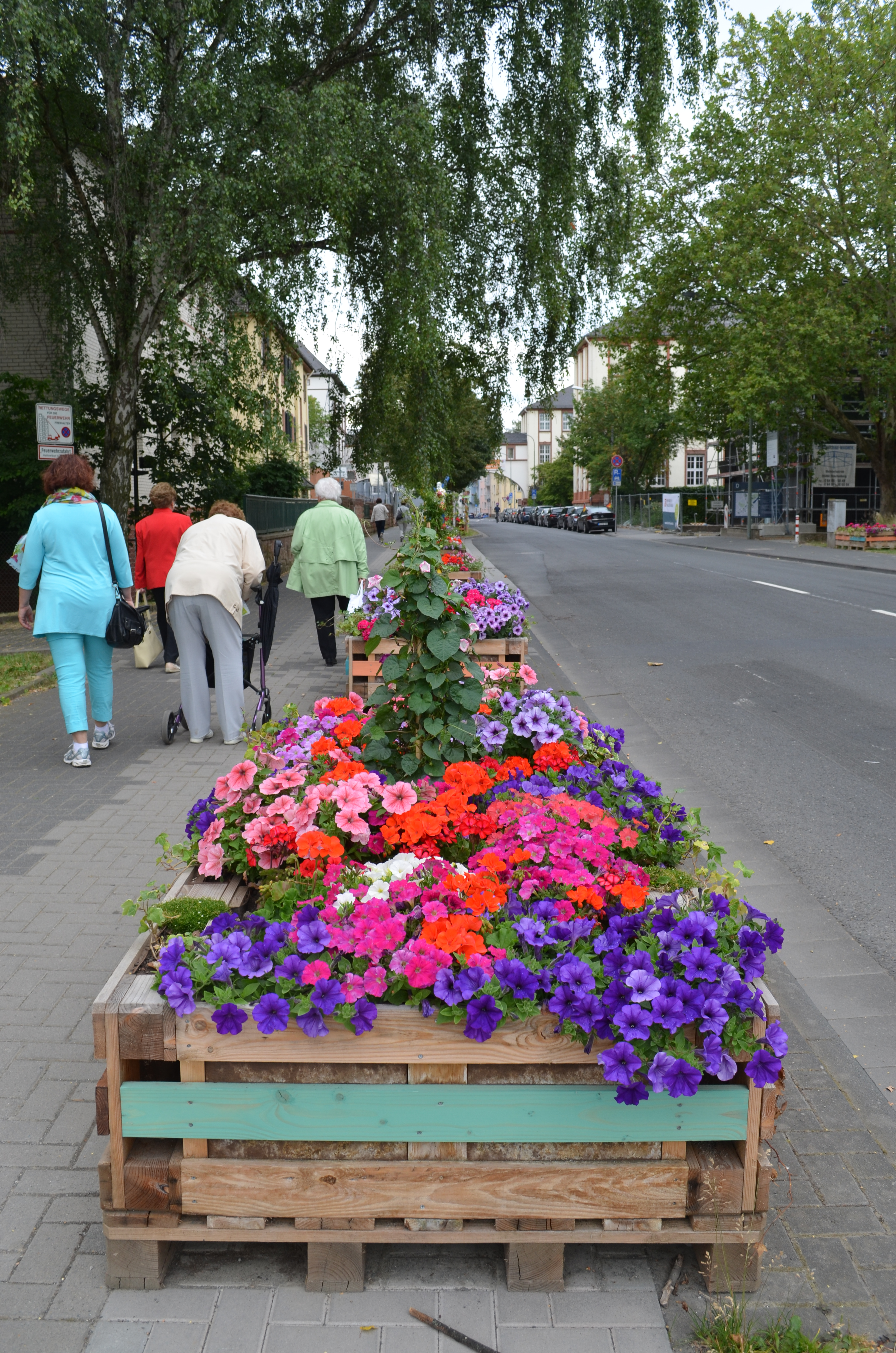 Gießen, Landesgartenschau, Innenstadtkorridore, Blumenkästen